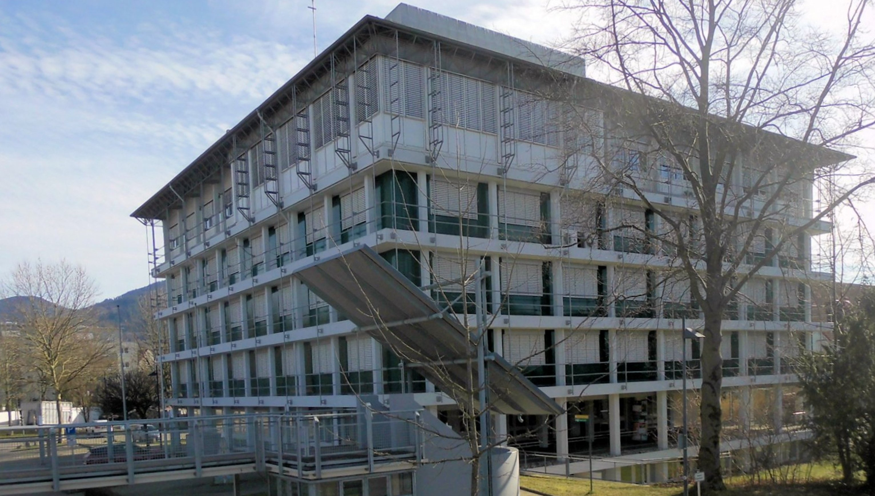 Landratsamt und Rathaus der Stadt Müllheim, Baden